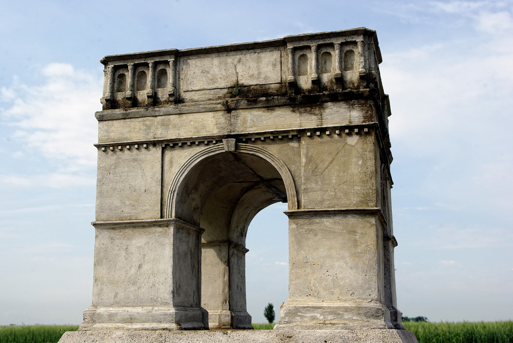 Heidentor (Carnuntum) Niederösterreich (Modell des ursprünglichen Zustands)